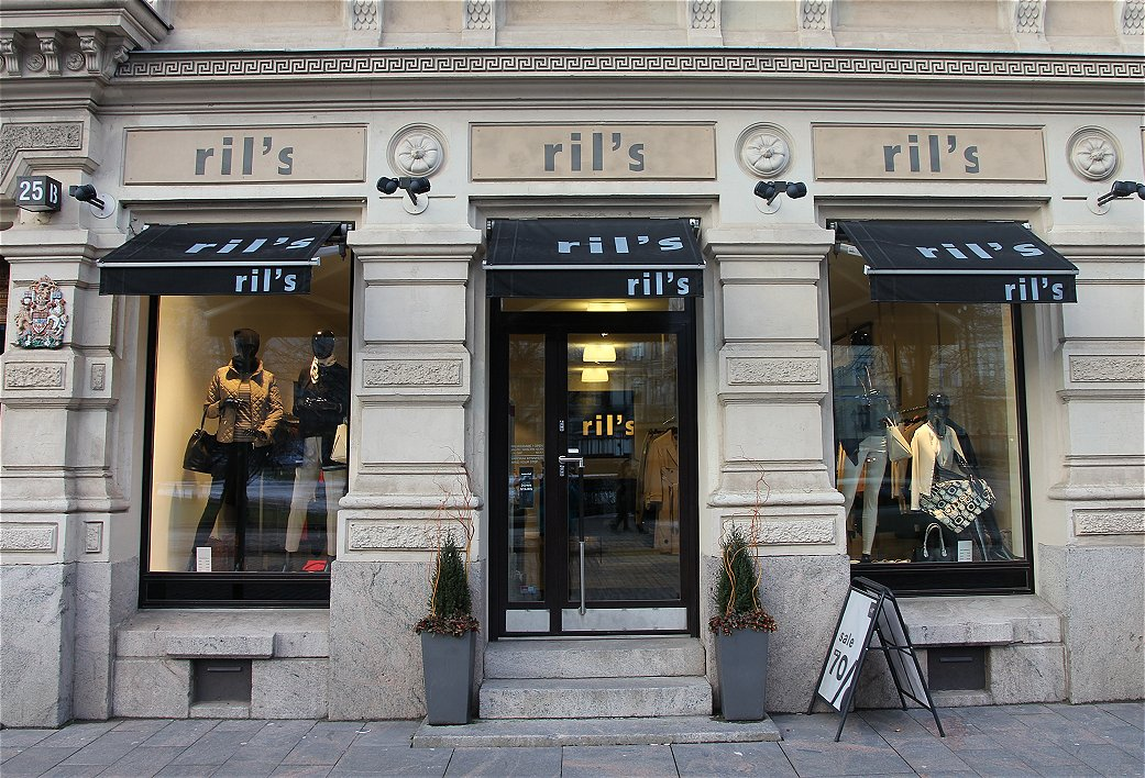 Suomalaisen koru-, vaate- ja taidemuotoilija Ritva-Liisa Pohjalaisen nimestä lyhenteenä muodostetun Ril's tuotemerkin myymälä Helsingin Pohjoisesplanadilla. Ril's on suomen suurimpiin muotialan yrityksiin lukeutuvan Luhta Sportswear Companyn tuotemerkki.